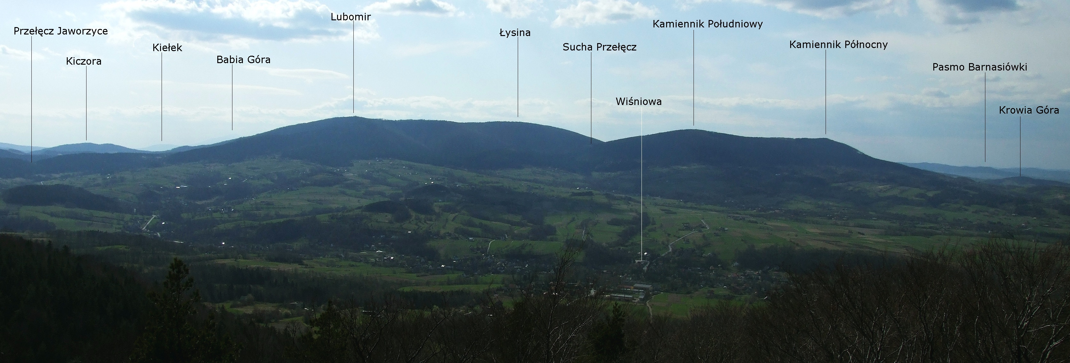 Widok z Księżej Góry na Beskid Makowski